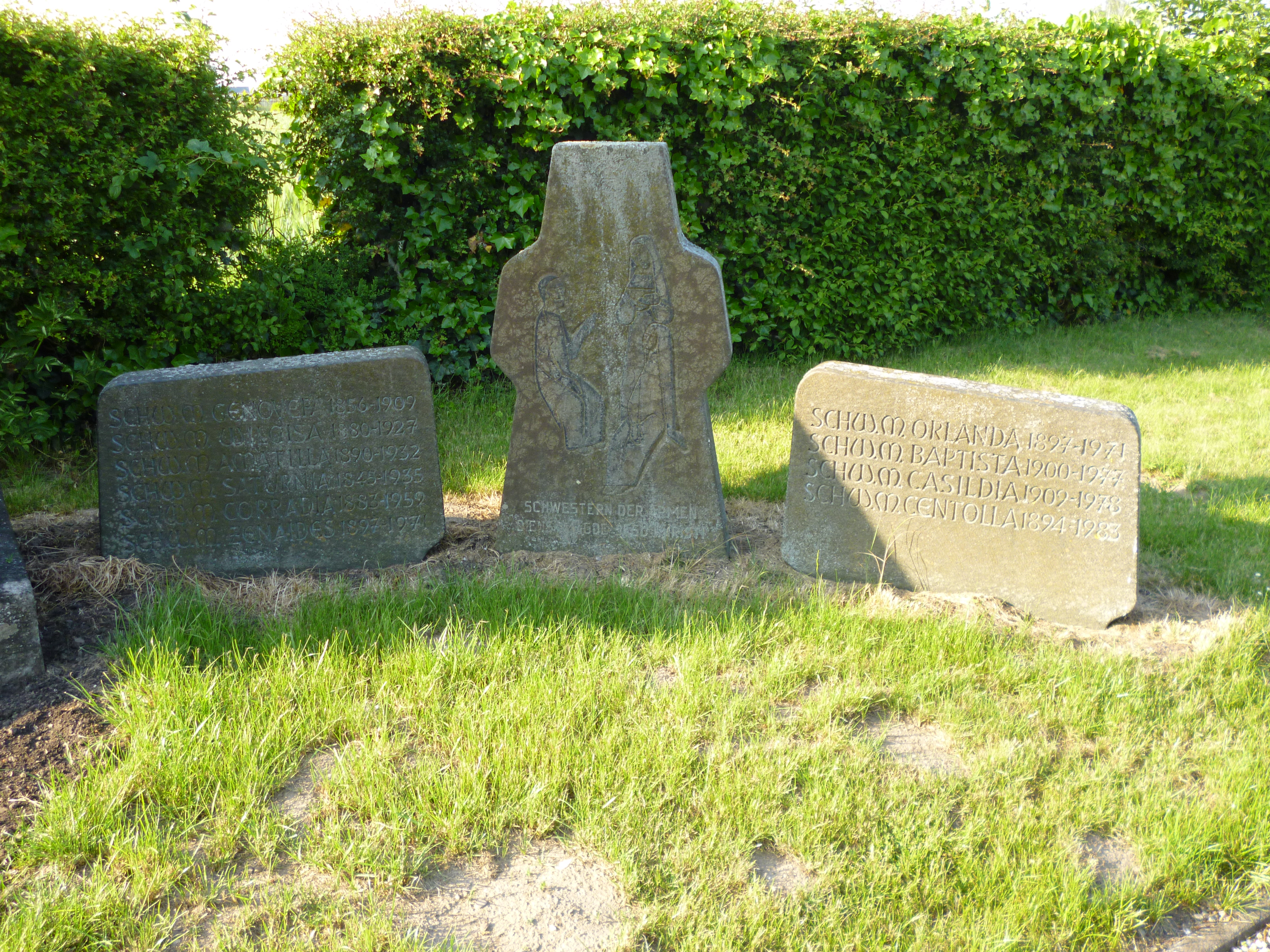 Grabmal der Ordensschwestern, die im Haus Marien gelebt und gearbeitet haben